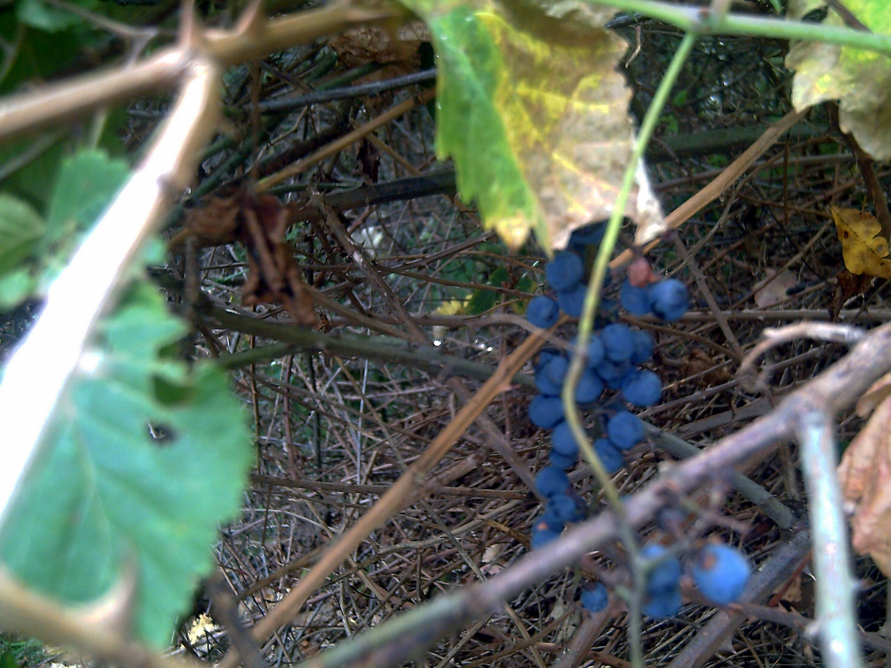 Vitis vinifera var. sylvestris Fruits in Sierra Madrona, Spain